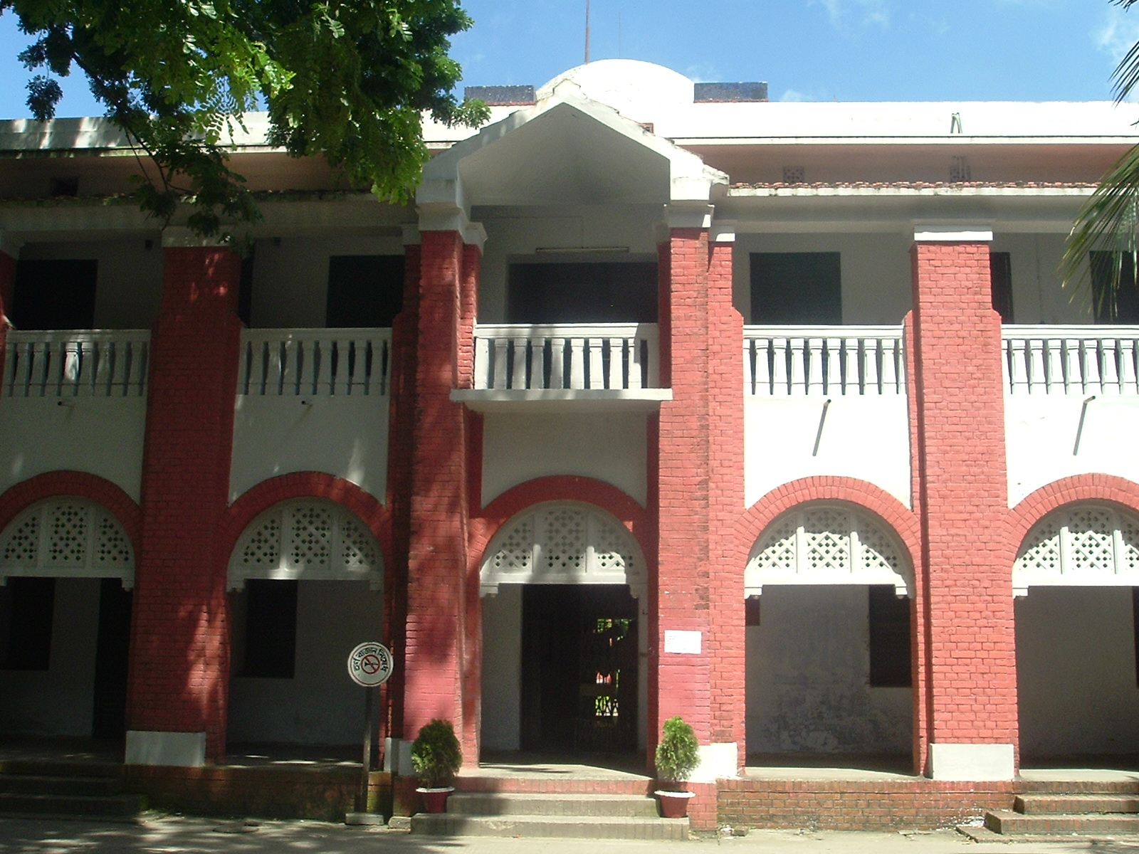 Registrar Building, BUET, Dhaka.